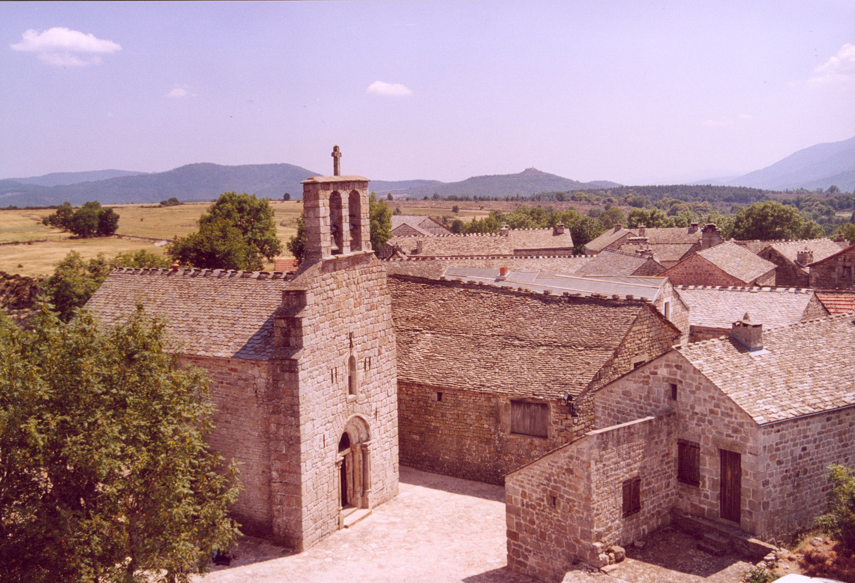 L Garde-Guerin (Lozère) Auteur : GIRAUD Patrick